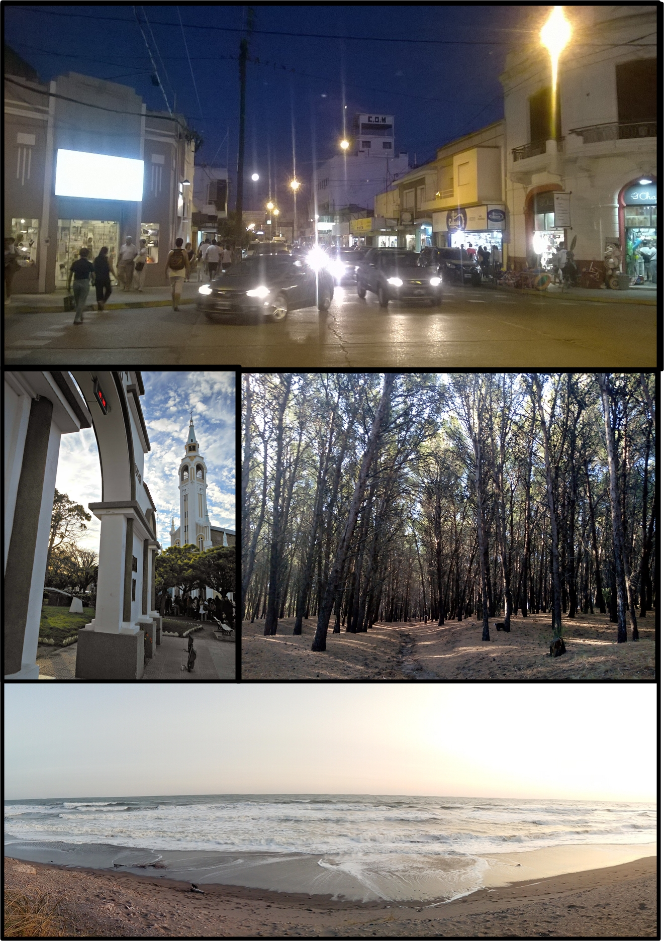 Collage del partido de Coronel Rosales, donde se muestra la ciudad de Punta Alta y Pehuen Co